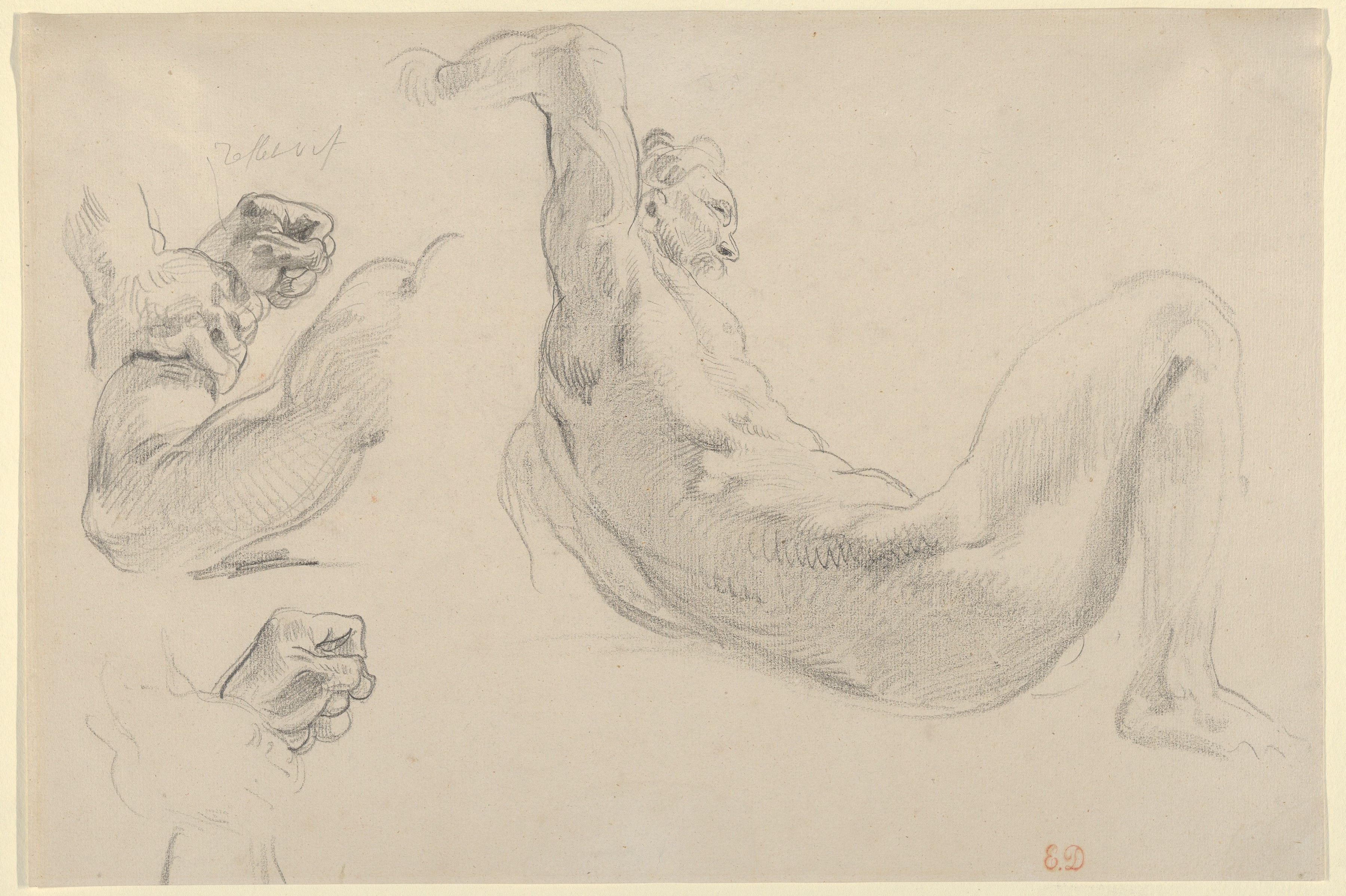 Drawing; Drawings